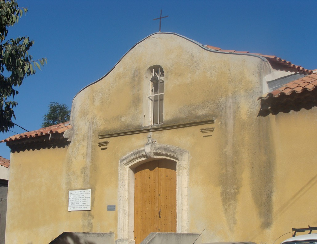 La chapelle de Saint-Jean-du-Désert, à Marseille (11e arr.), état actuel.